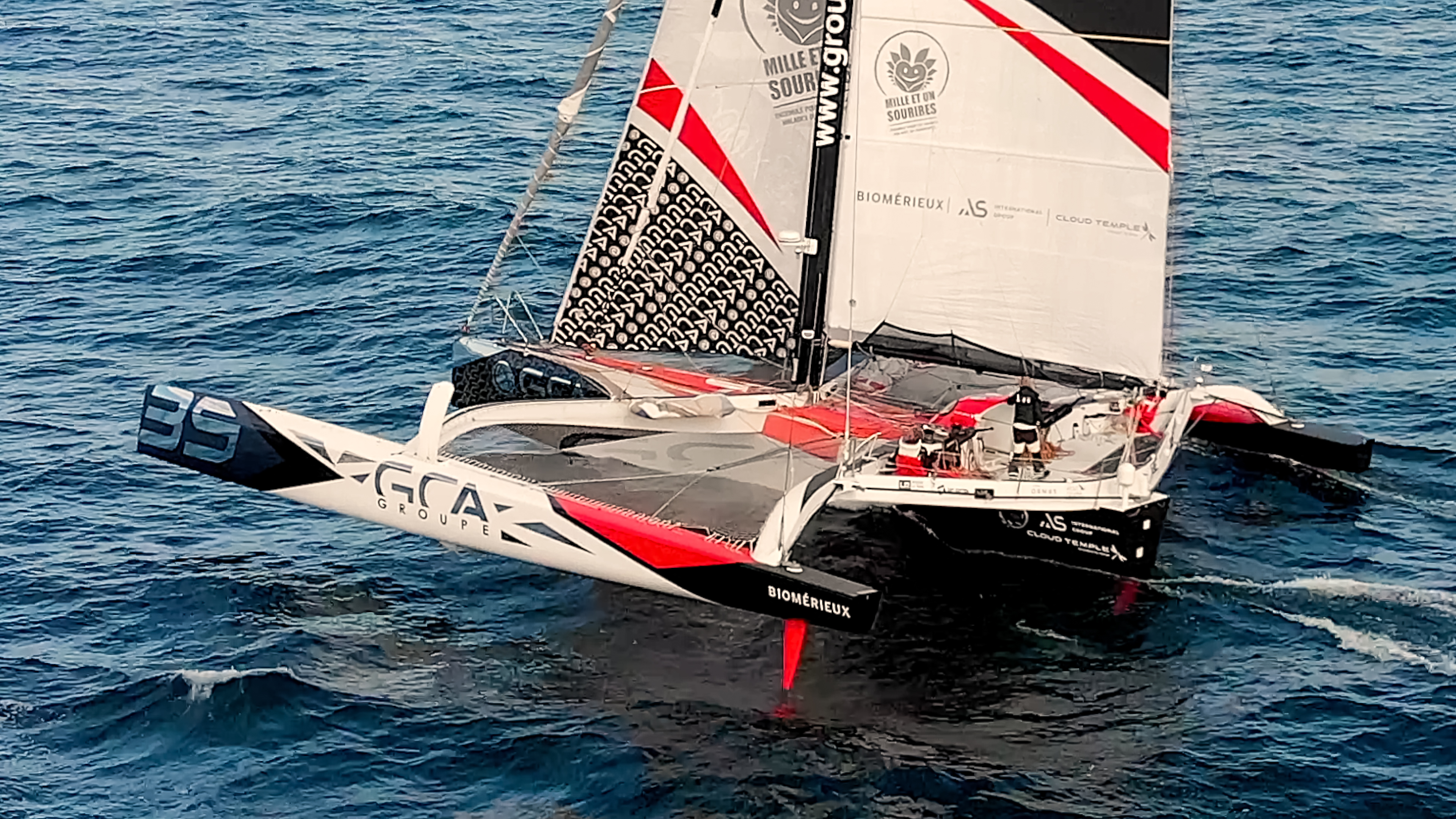 © Bonnie and Clark